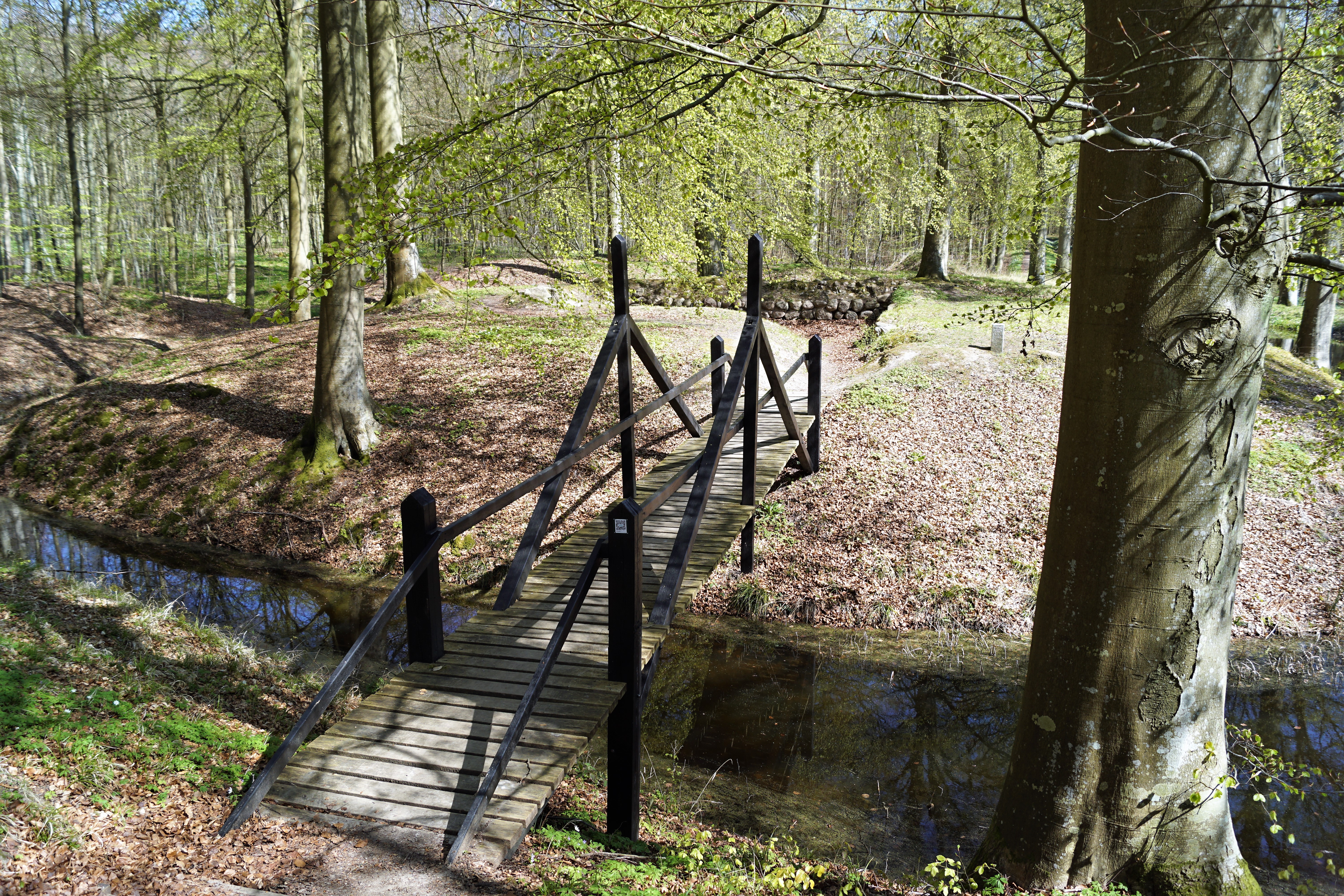 Broen til voldstedet